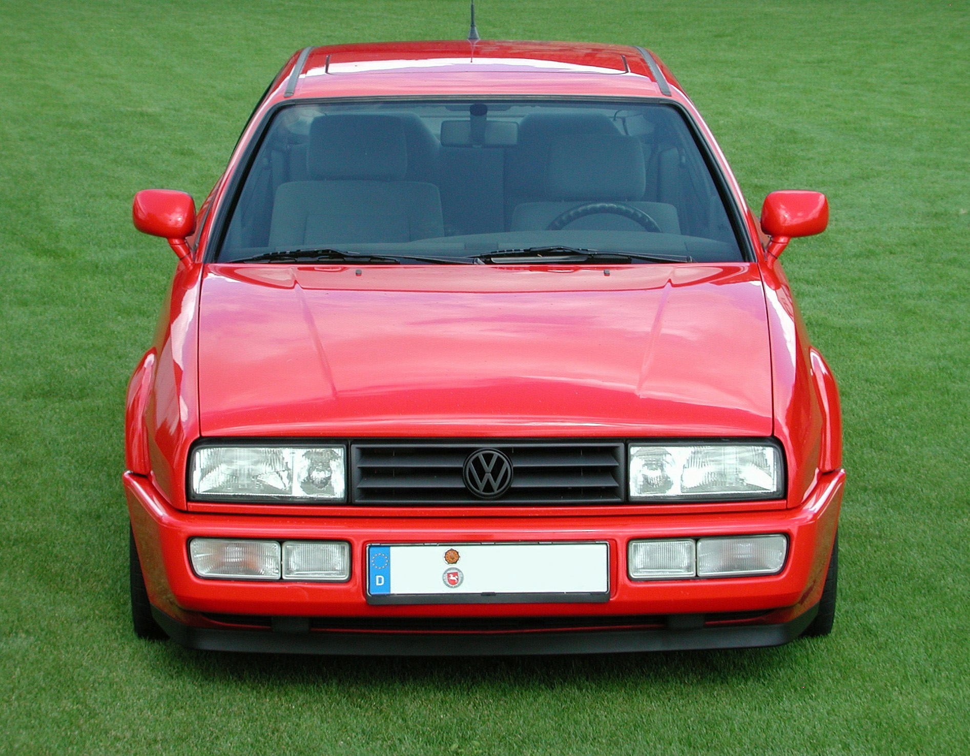 VW Corrado 16V 100kW Baujahr 1992, bis auf Felgen original (Frontansicht)